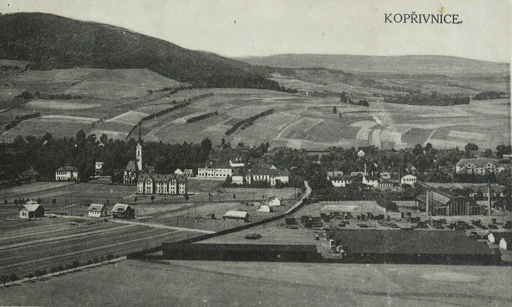 POHLED DO MINULOSTI